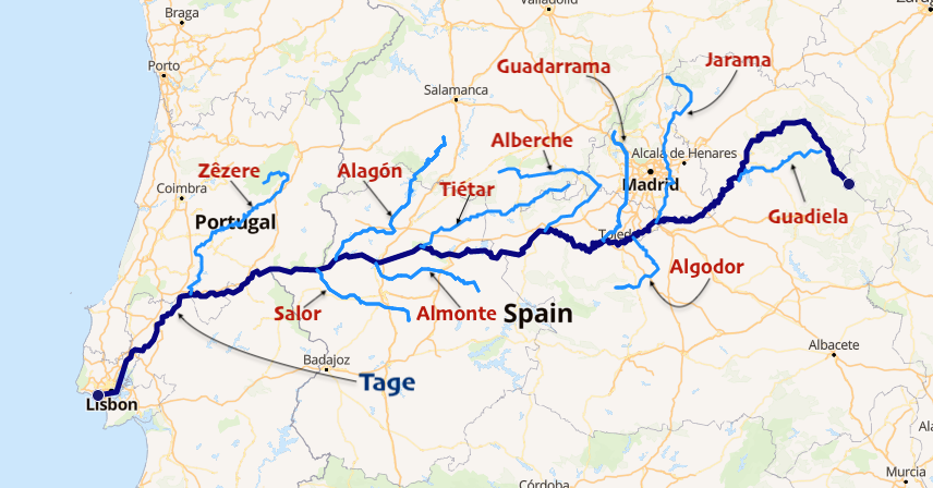 carte réalisée sur umap This map may be incomplete, and may contain errors. Don't rely solely on it for navigation.